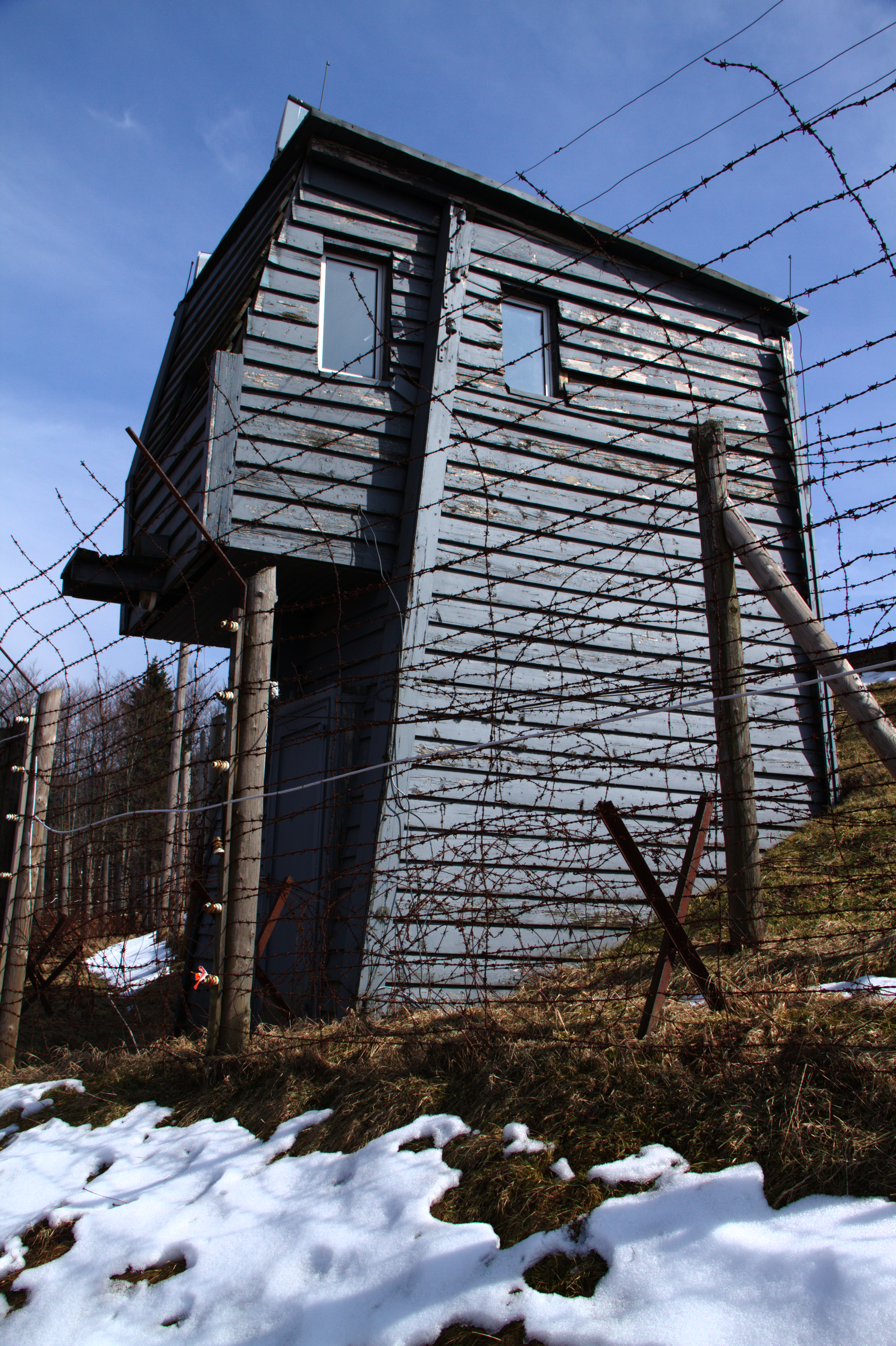 Camp de concentration de Natzwiller-Struthof